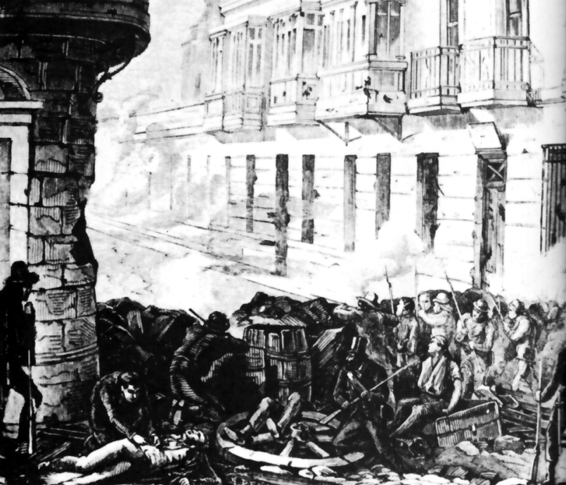 Barricadas en las inmediaciones del cuartel de Santa Catalina, donde fue sitiado las tropas de los Gutiérrez, sublevados contra el gobierno de Balta. Lima, julio de 1872